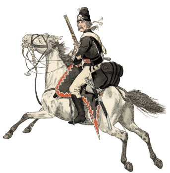 nach Knoetel 1910; preuss husaren Rgt Ruesch 1758